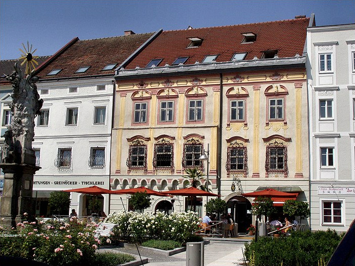 Lebzelterhaus Vogl auf dem Stadtplatz von Eferding